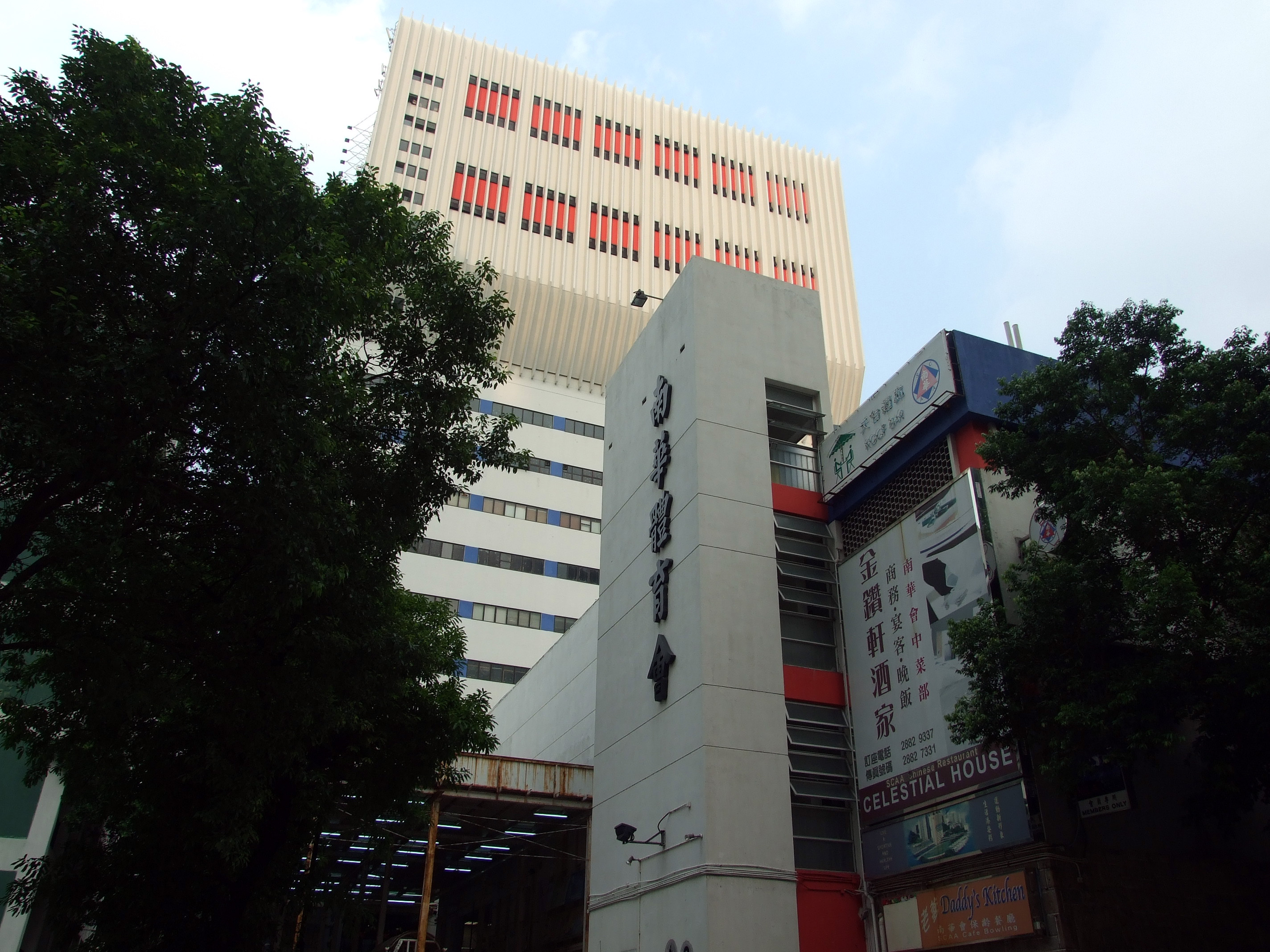 中文（香港）: 南華體育會